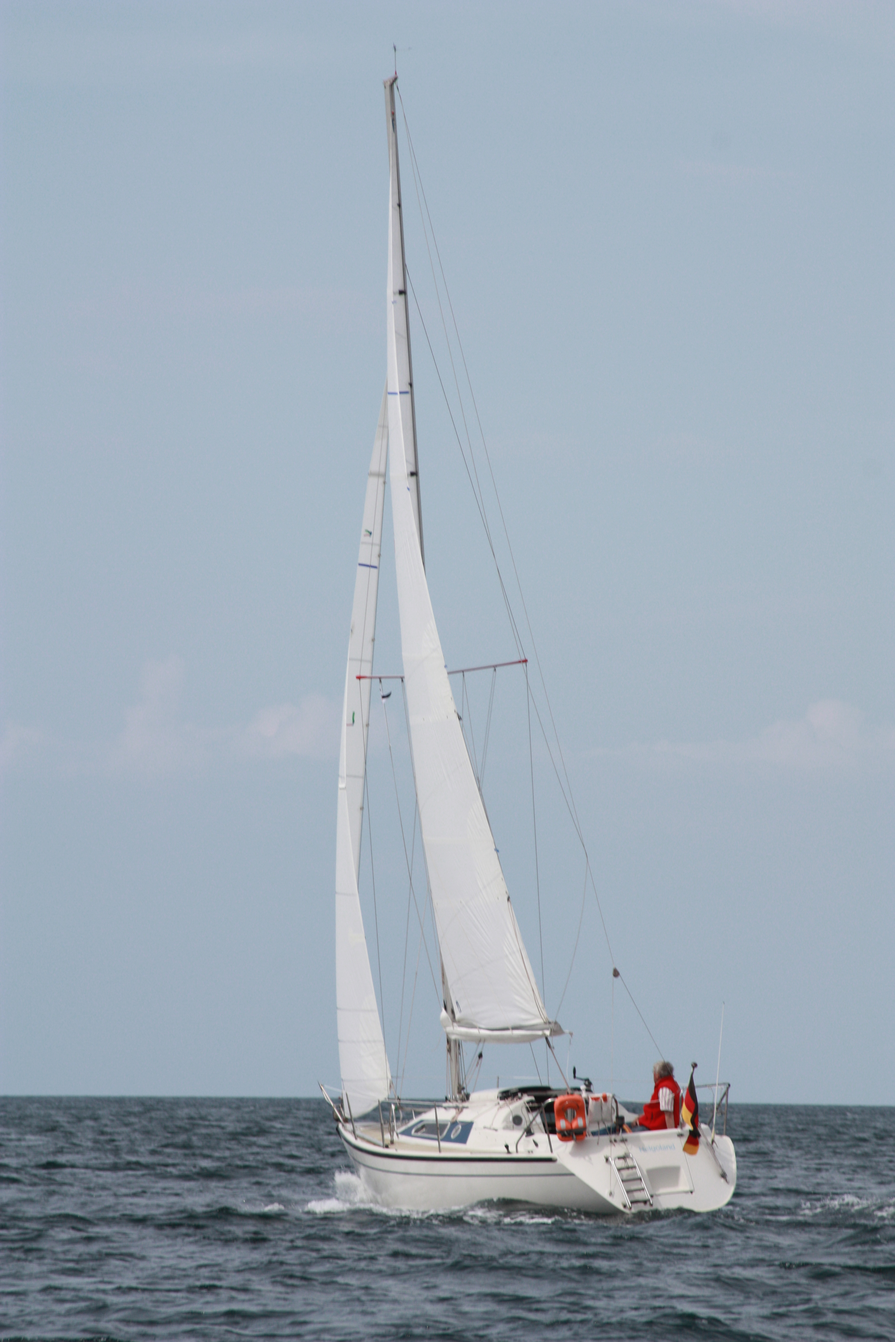 Heligoland, Helgoland